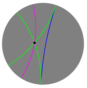 Ultraparallel lines in Poincaré disc model